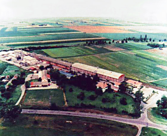 Vue Globale de la commune de Rimski Šančevi